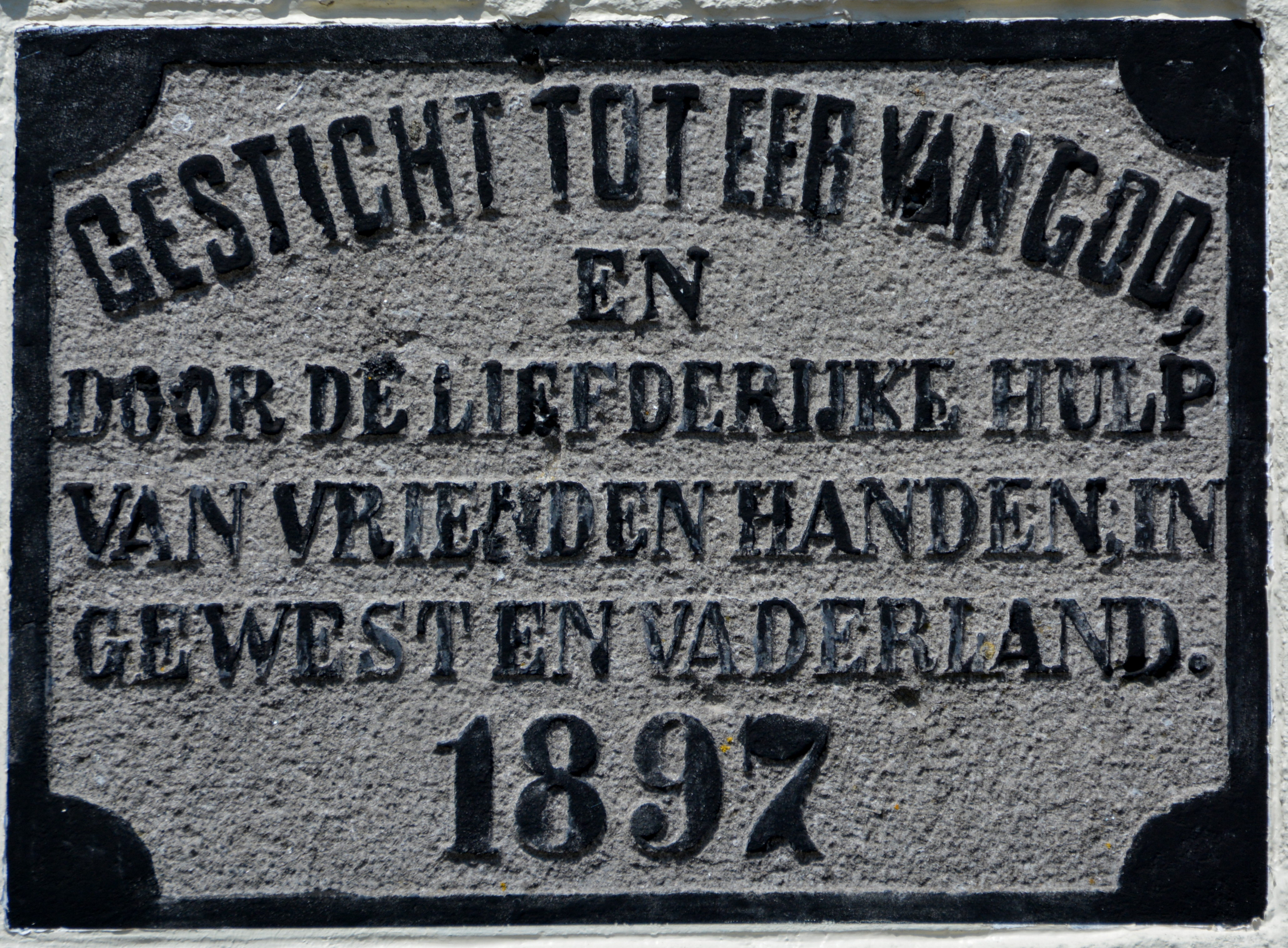 Eestrum, gereformeerde kerk (gevelsteen).